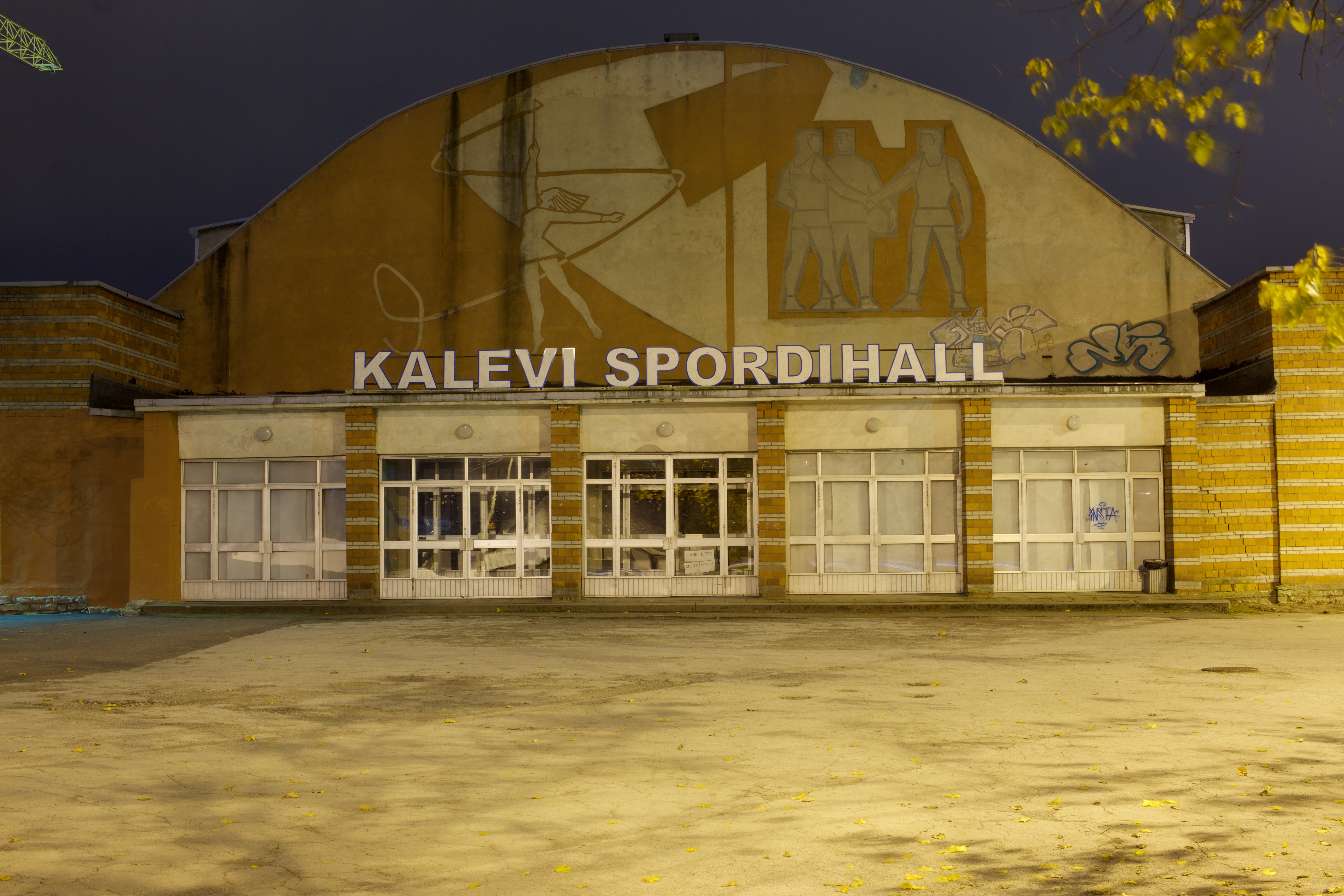 Kalevi Spordihall